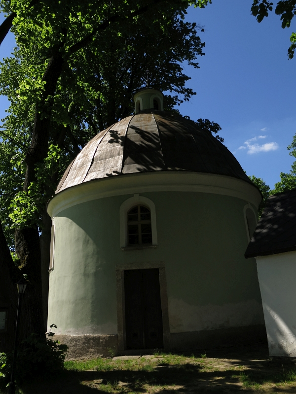 Kaple svatého Jana Nepomuckého, při hřbitově, Těchobuz.